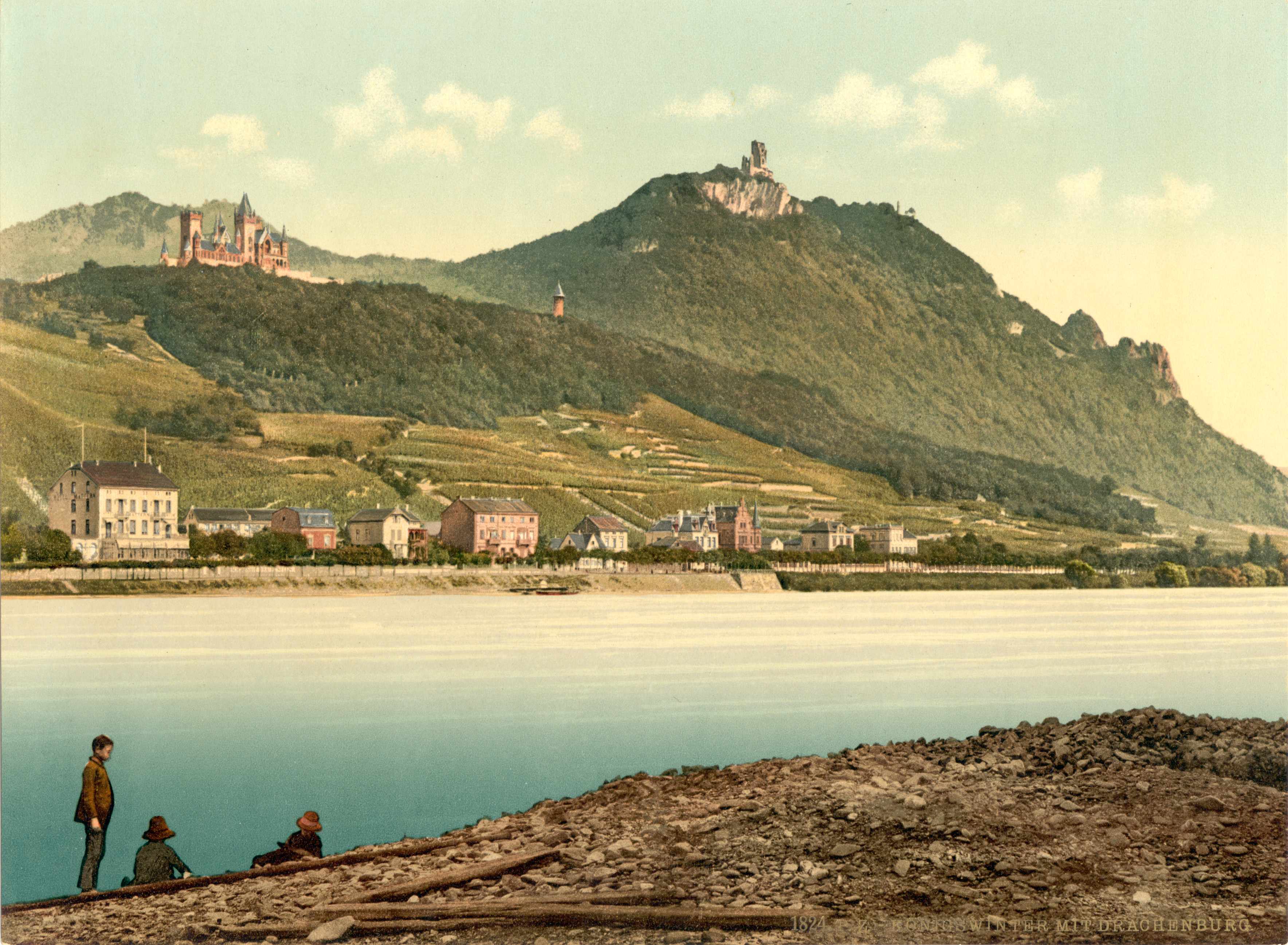 Königswinter